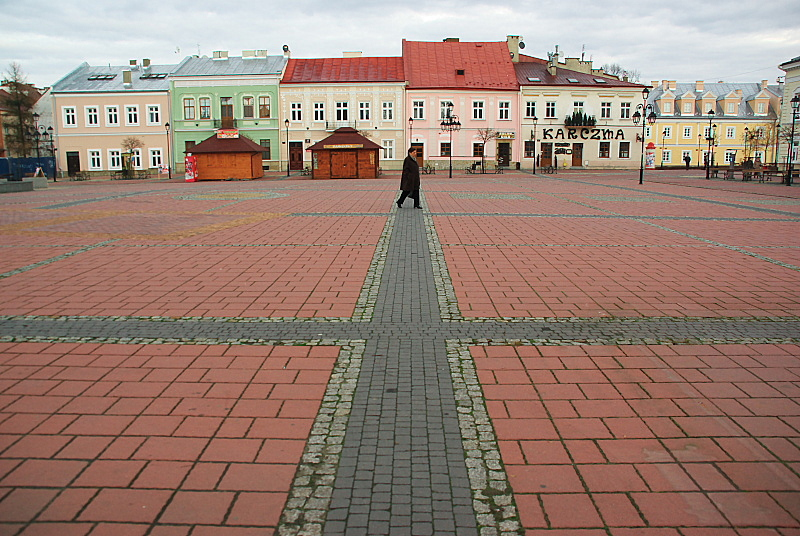 widok na północną część rynku Sanok